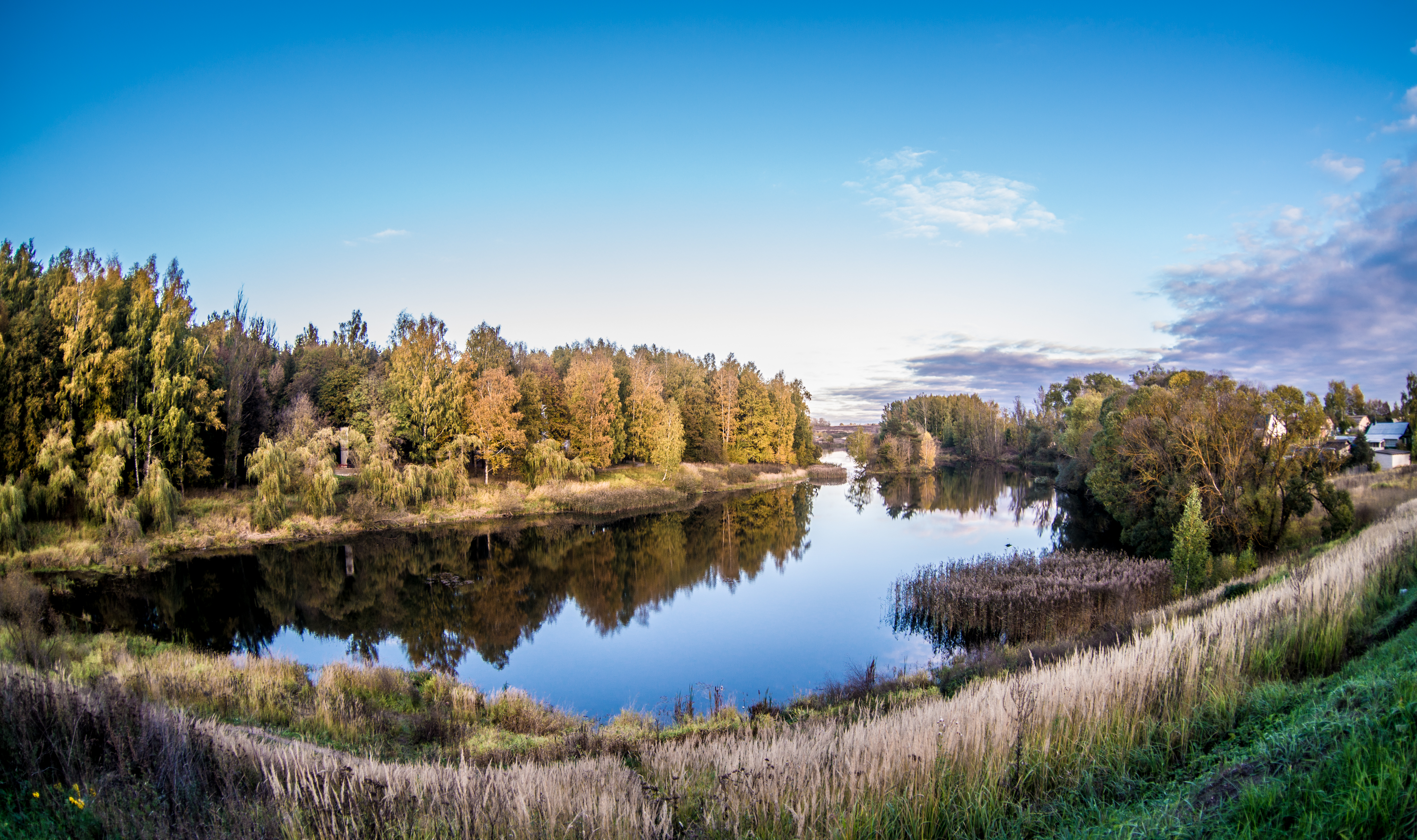 Озеро и роща у деревни Нагать: Располагается в 10 км к югу от г. Смоленска, в 5 км на северо-запад от пос. Талашкино, д. Нагать, Смоленский район, Смоленская область This image is related to the protected area of Russia number 6710158